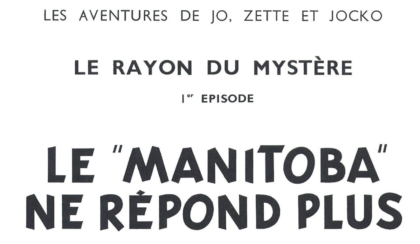 Logo Jo Zette et Jocko Le Manitoba ne repond plus